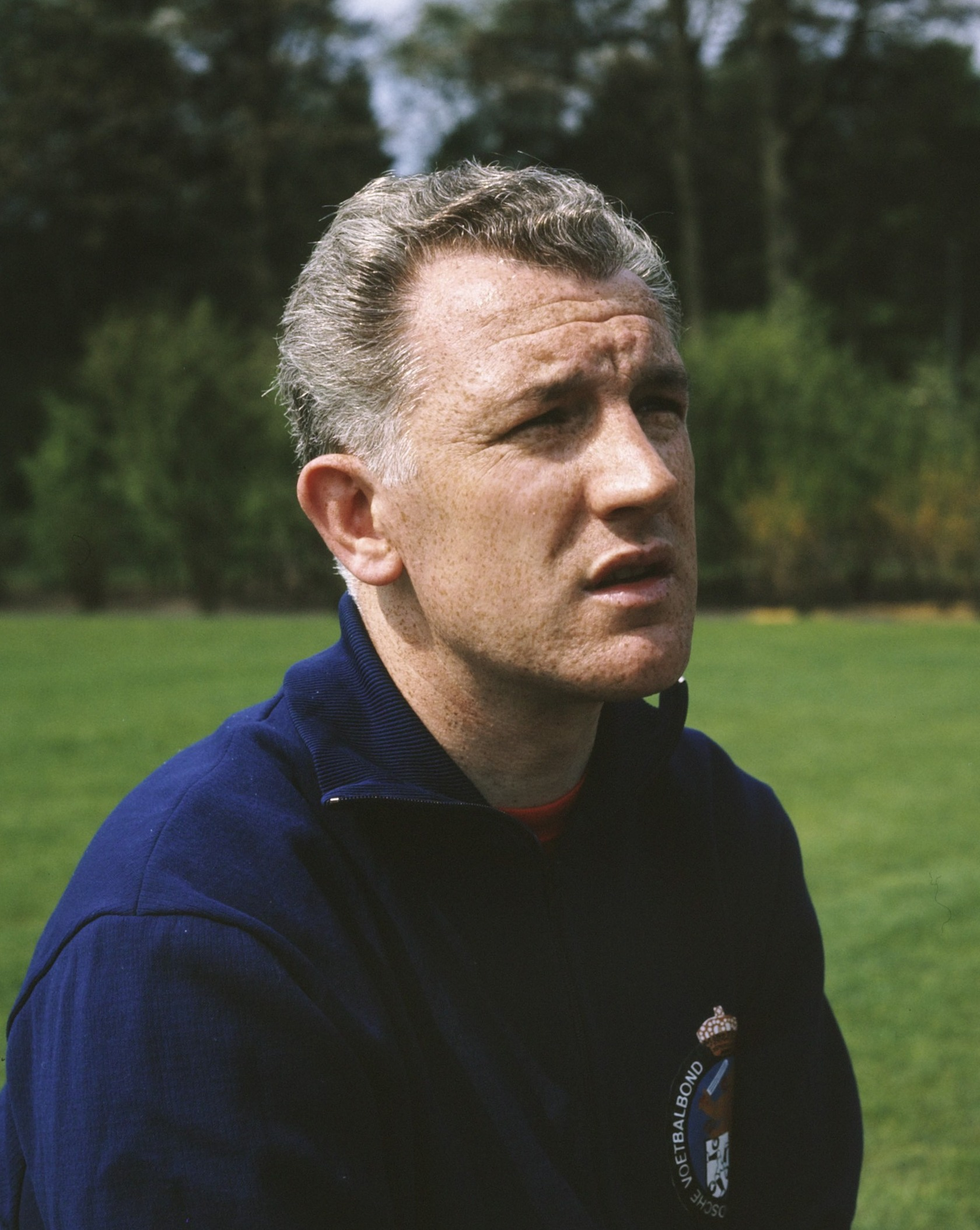 Training Nederlands Elftal te Zeist; trainer Kessler (George)